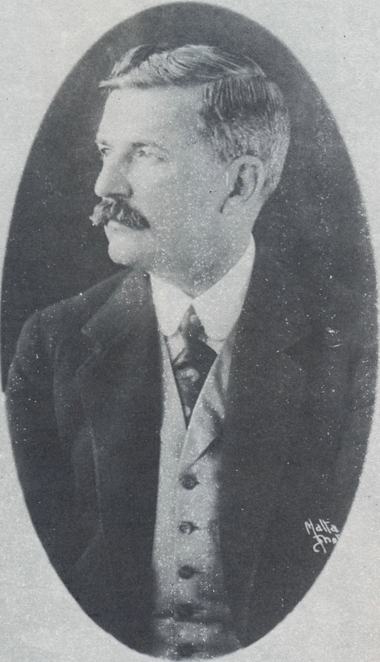 O nono presidente do Brasil, Venceslau Brás.